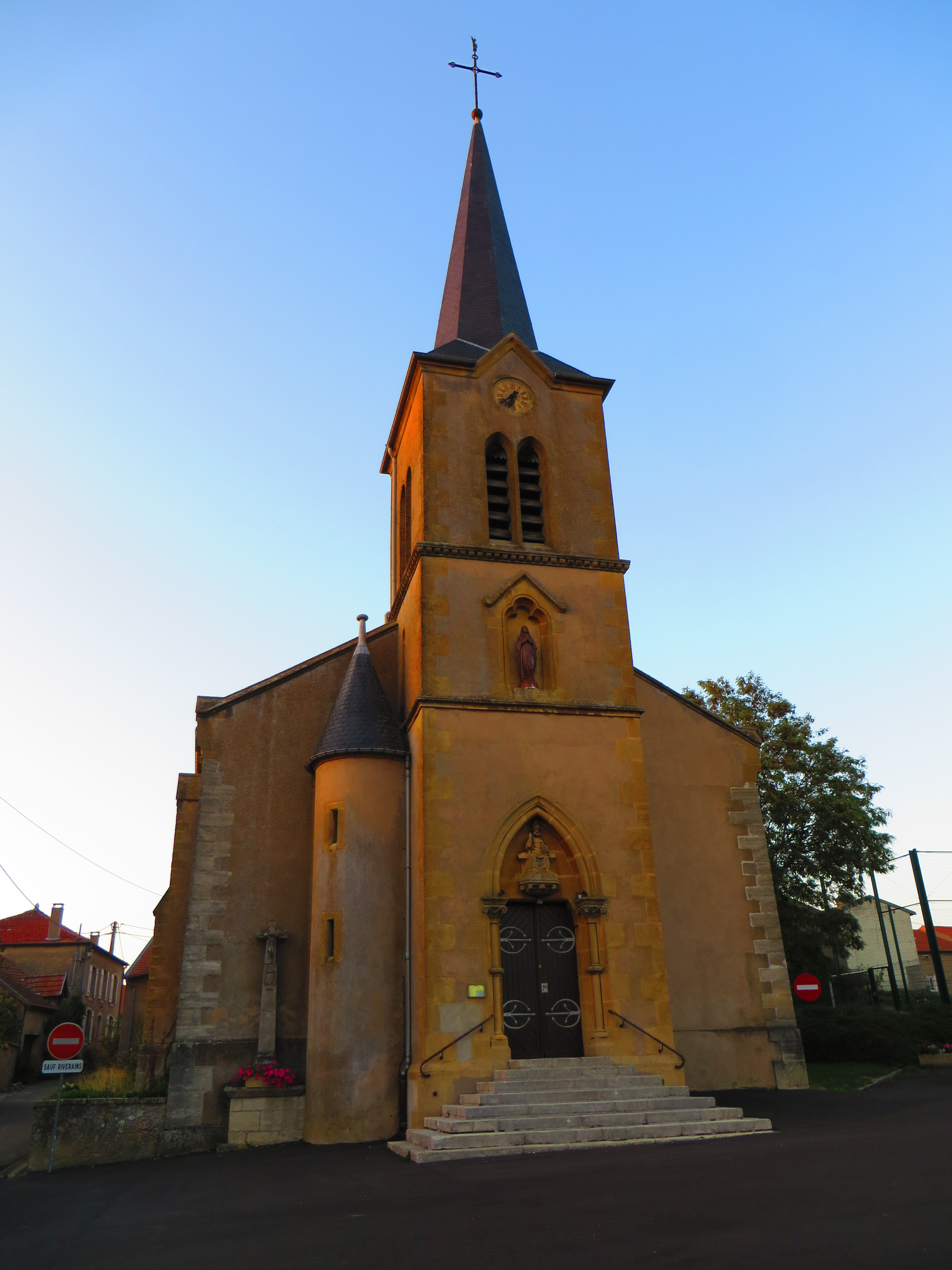 Oron l'église Saint-Pierre-aux-Liens